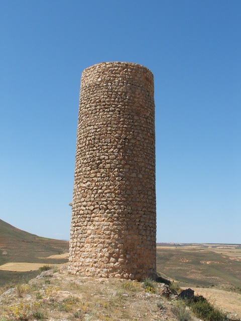 Atalaya de vigia y vigilancia Musulmada de "La Veruela" situada en Caltojar Soria España.